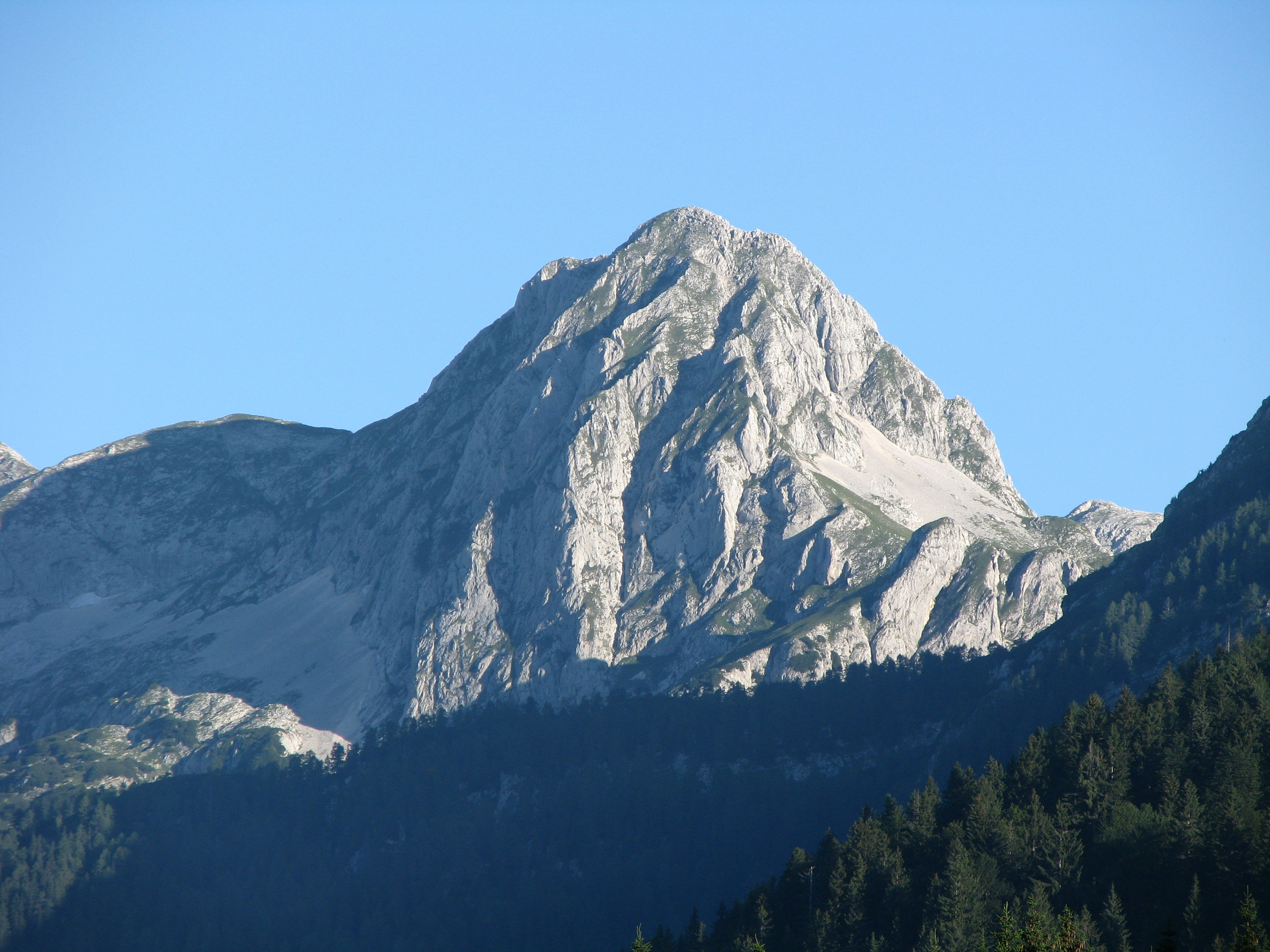 Mišelj vrh (2350 m)